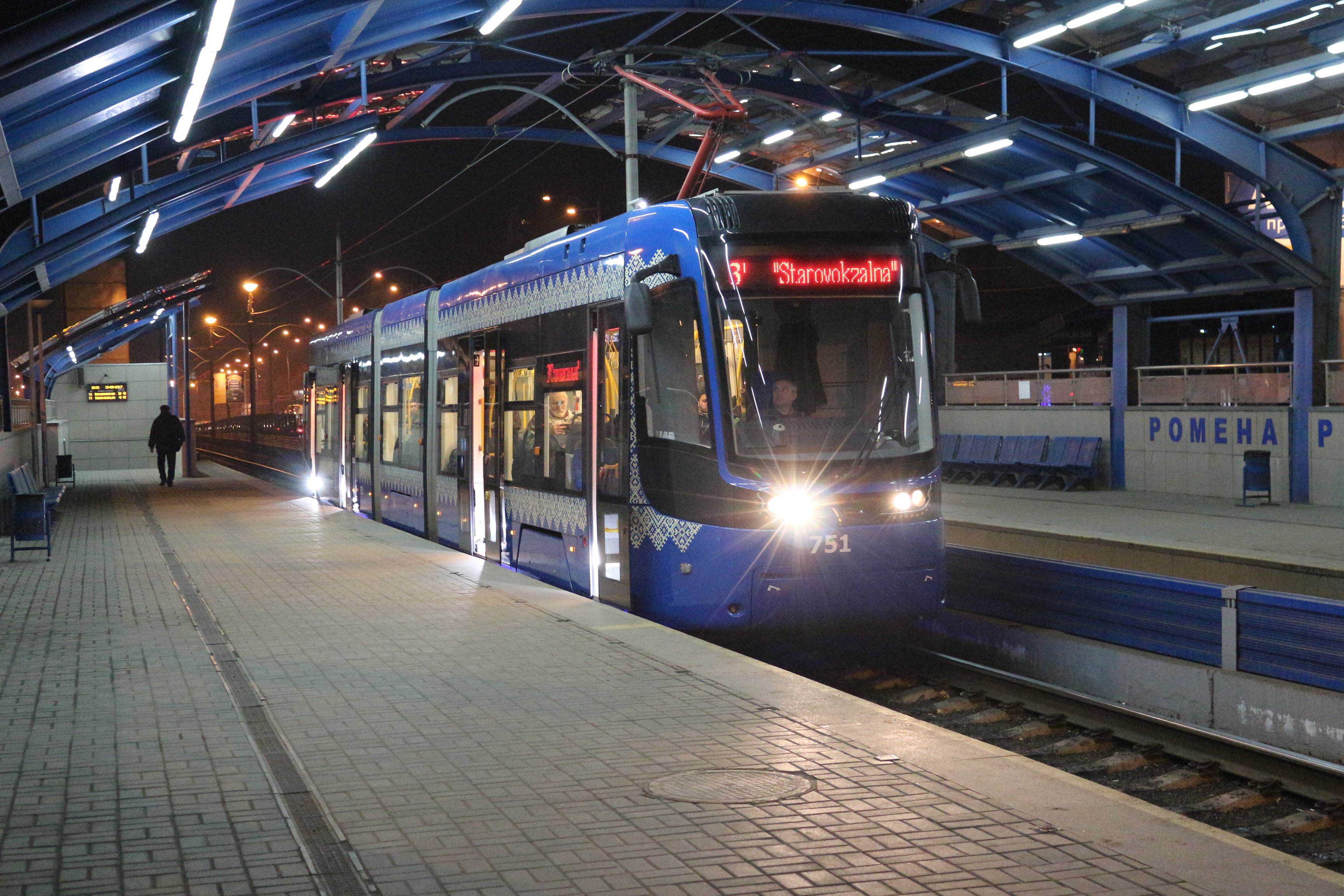 PESA w Kijowe